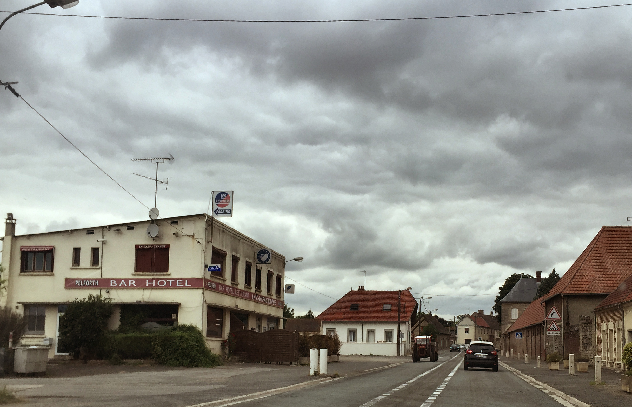 Een restaurant aan de voormalige Route Nationale 17 in Frankrijk